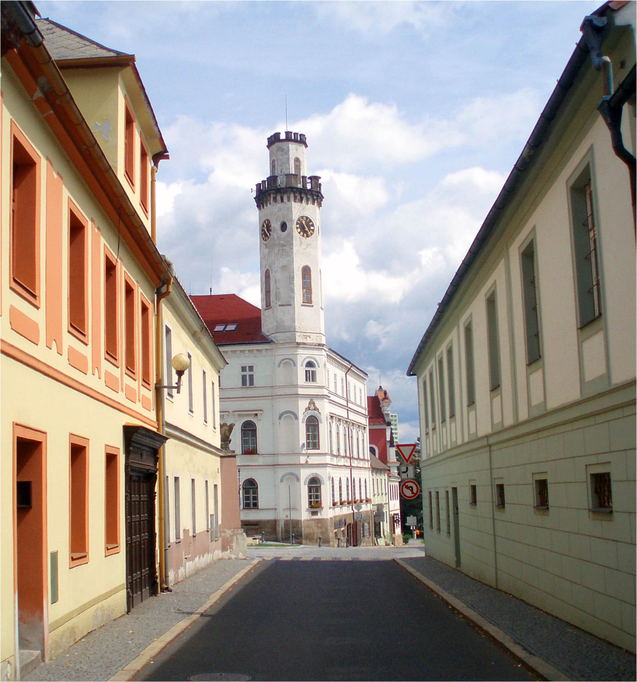 Blick zum Rathaus Klášterec nad Ohří (Klösterle), Tschechien